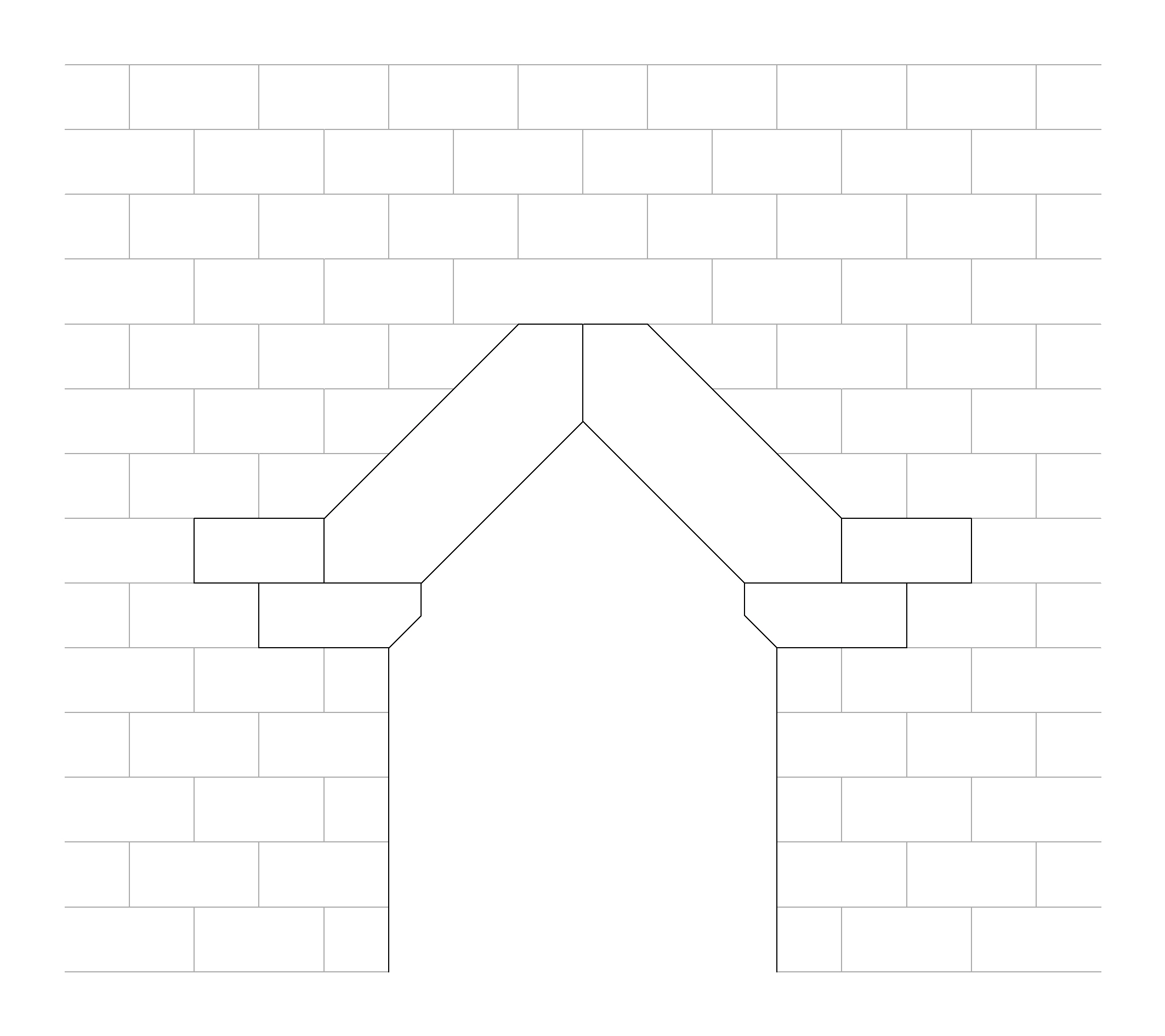 Giebelbogen